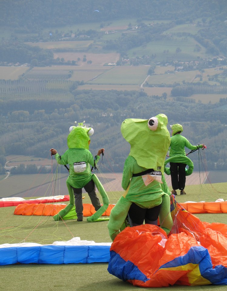 Parapentistes sur l'aire de décollage du "Carnavicare" pendant la Coupe Icare 2007. Saint Hilaire du Touvet, Isère, France